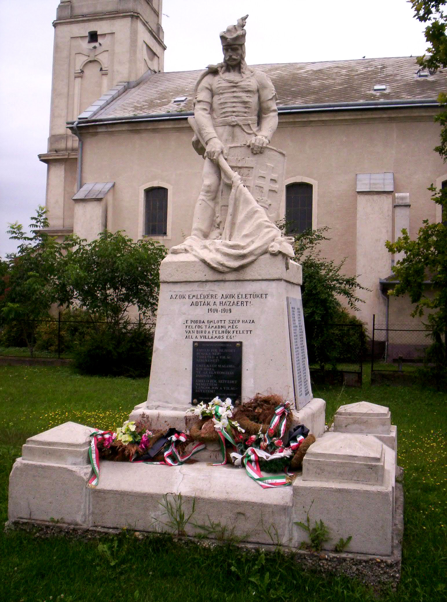 Az első világháború hősi halottainak emlékműve Solton. Molnár Mihály alkotása (1924) – photo taken by uploader User:Csanády in 2006.